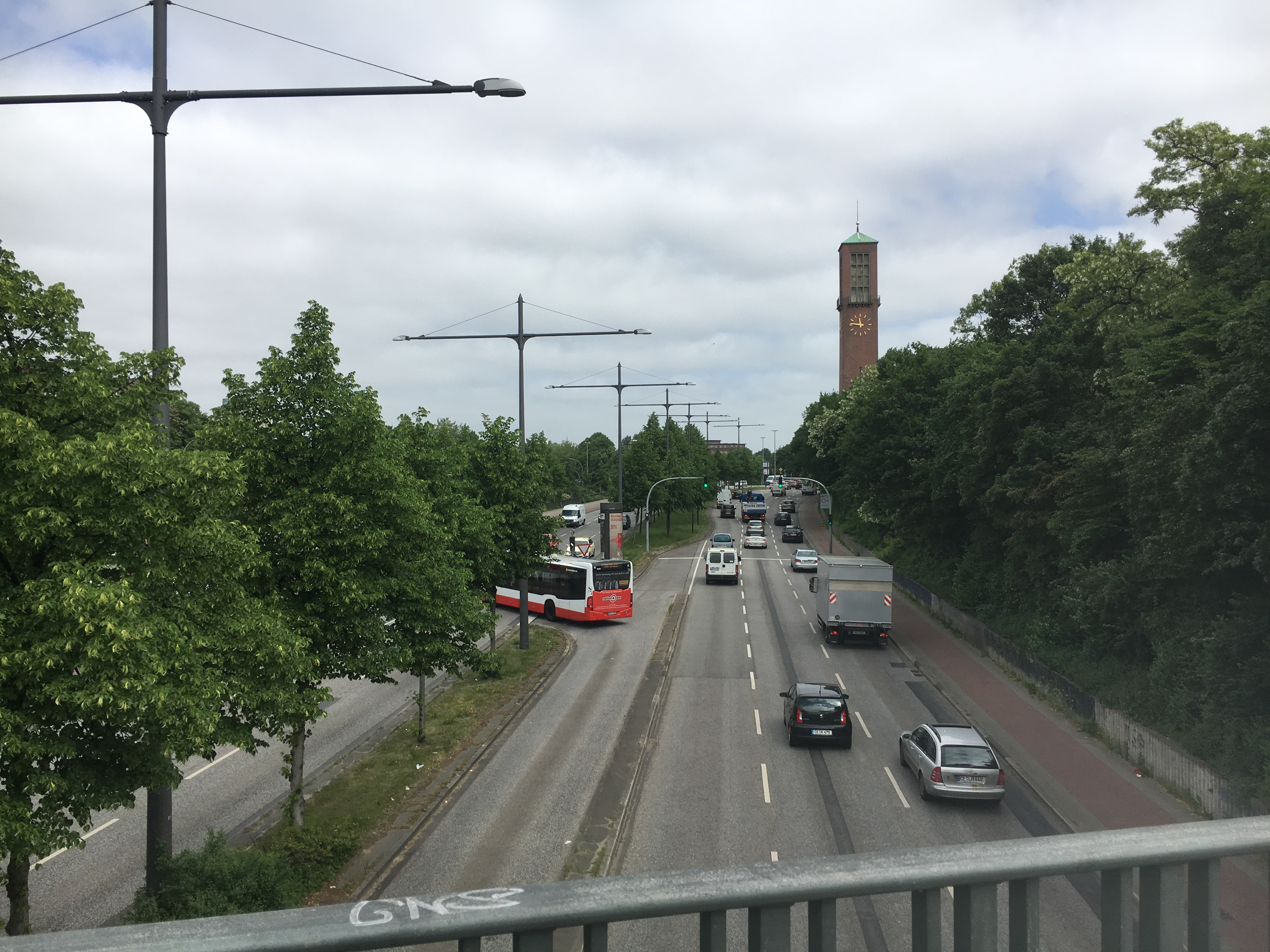 Bürgerweide, Blick vom Berlinertordamm stadtauswärts